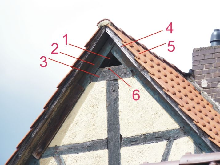 Eulenloch (Fachwerkhaus in Bonaforth) mit Fachbegriffen